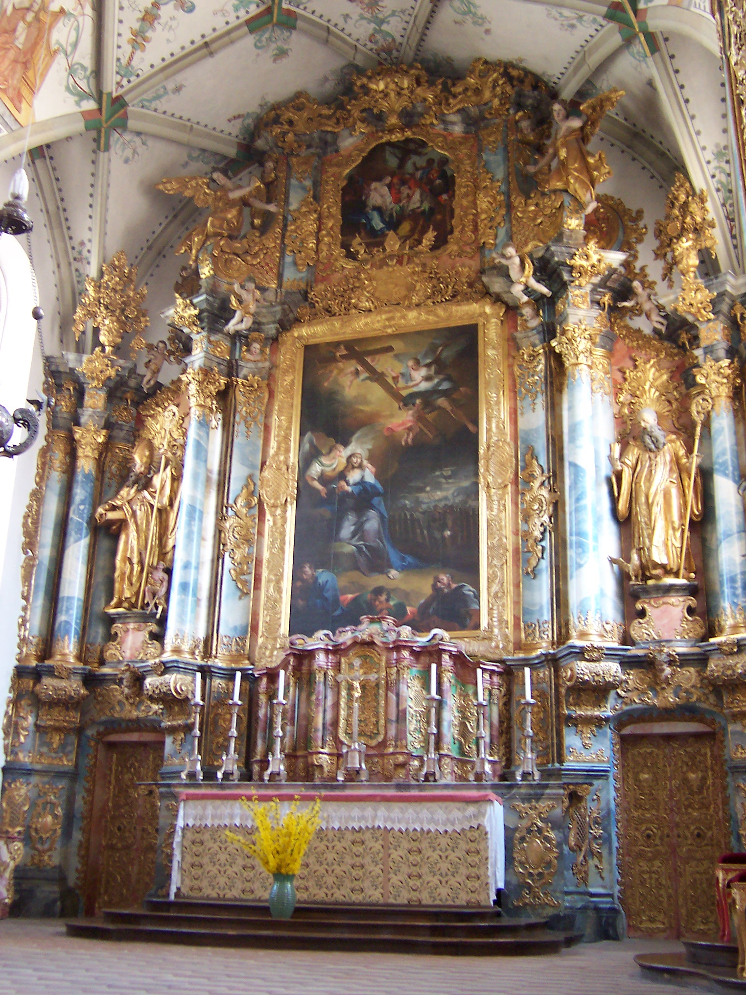 Choraltar mit Himmelsfahrt von Maria, Gemälde von Karl Rauber nach Tizians Assunta. Klosterkirche in Muri, Kanton Aaargau, Schweiz.